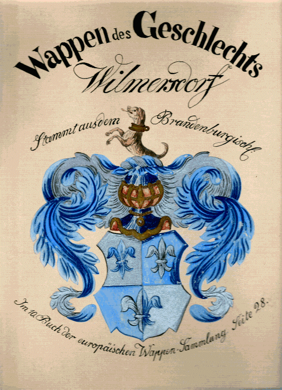 Wappen derer von Wimersdorff mit brauner Bracke „In von Silber und Blau geviertem Schilde drei zwei zu eins gestellte heraldische Lilien in verwechselten Farben. Auf dem Helm mit blau-silbernen Decken eine wachsende silberne Bracke mit goldenem Halsband.“